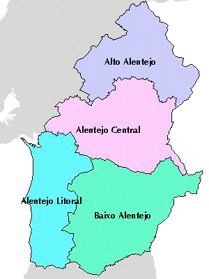 Sistema Nacional de Informação Geográfica - Instituto Geográfico Português - Homepages: - link